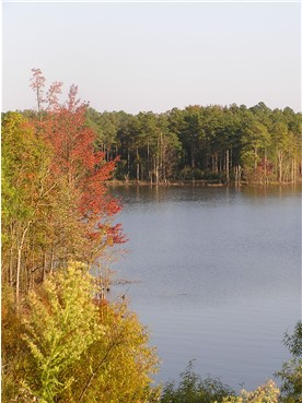 Falls Lake NC eigen foto